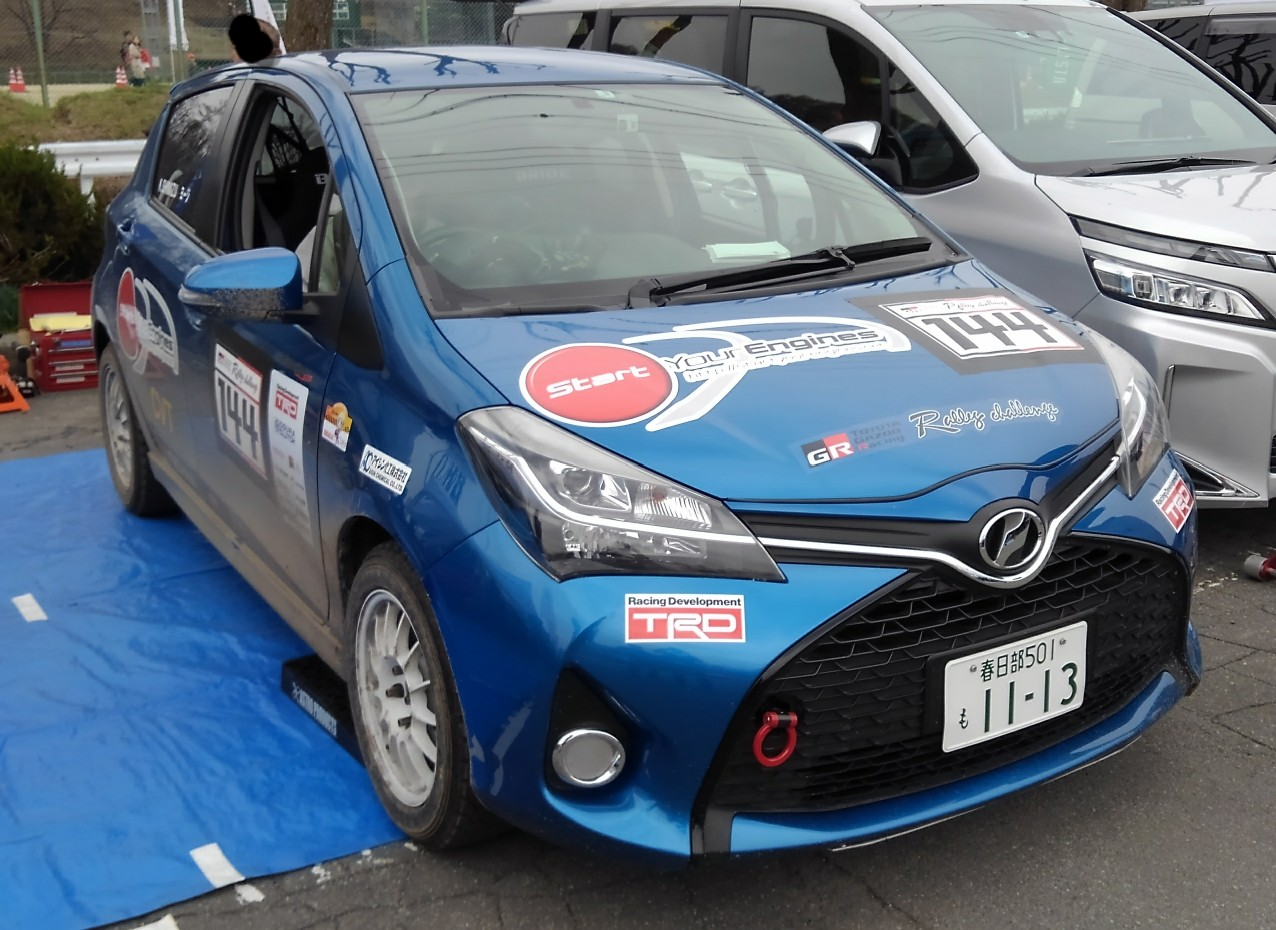 清水和夫がTGRラリーチャレンジでドライブする、『頑固一徹CVT』のヴィッツ